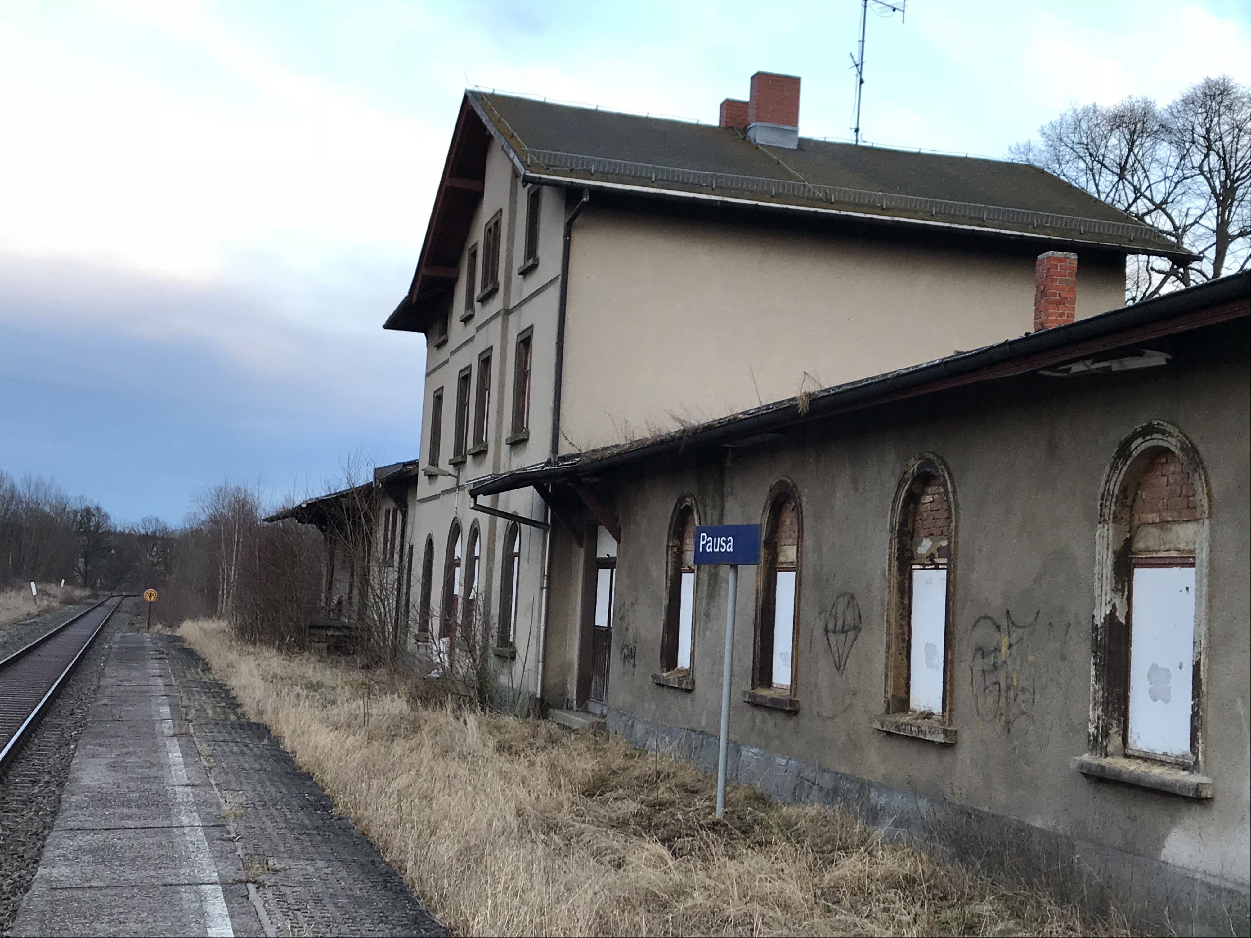 ehemaliger Bahnhof Pausa, Gleisseite (2018)